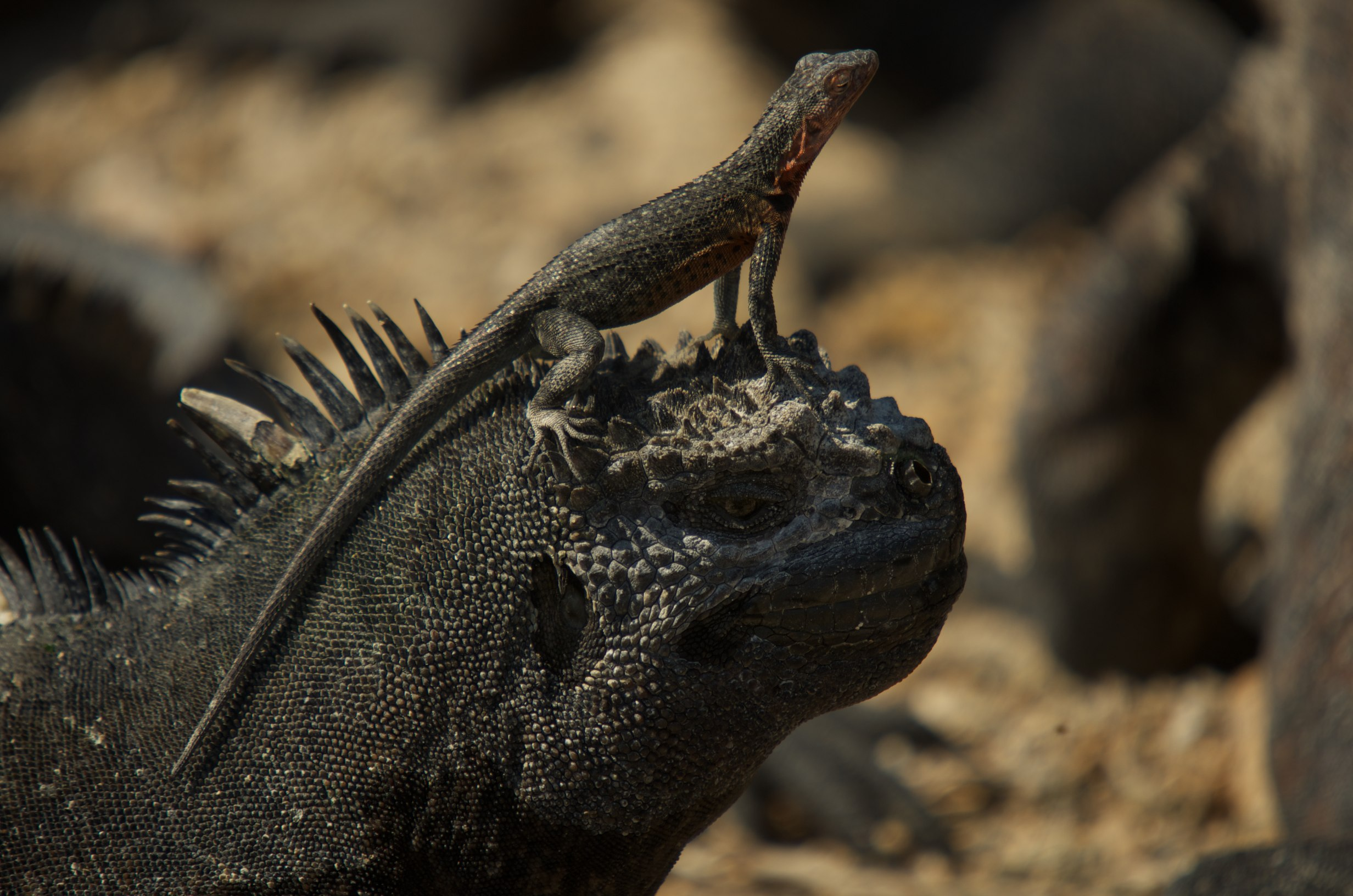 Tropidurus on top of a Marine Iguana. Punta Espinosa, Fernandina Island, Galapagos, Ecuador